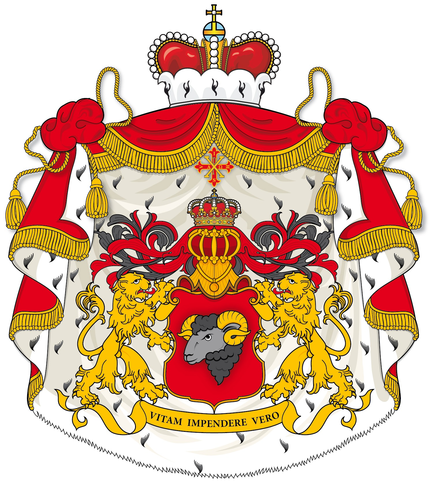 Erb knížecího domu Haugwitzů z Biskupitz.